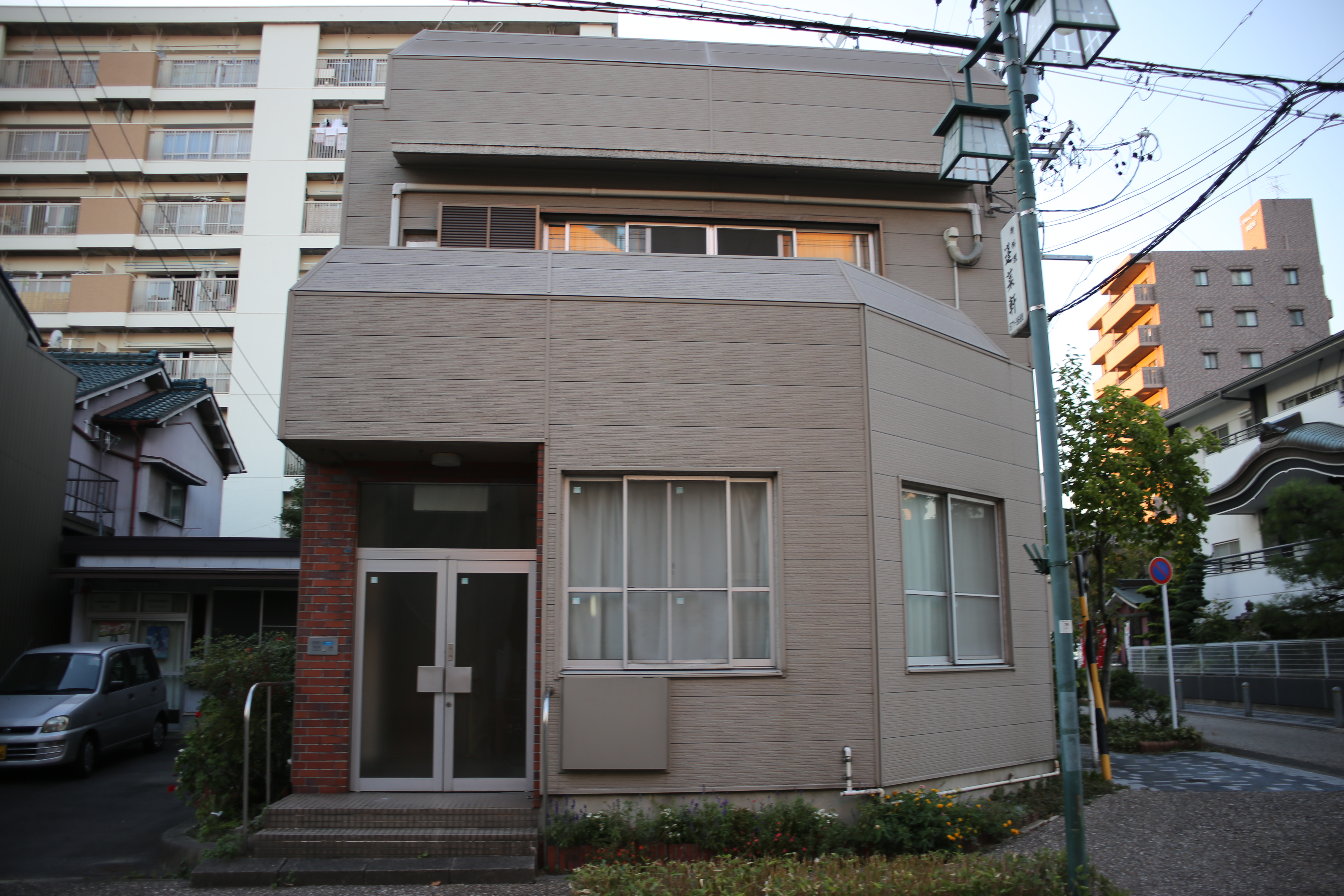 名古屋市熱田区神戸町のSLカートスポーツ機構本部を東側公道より撮影